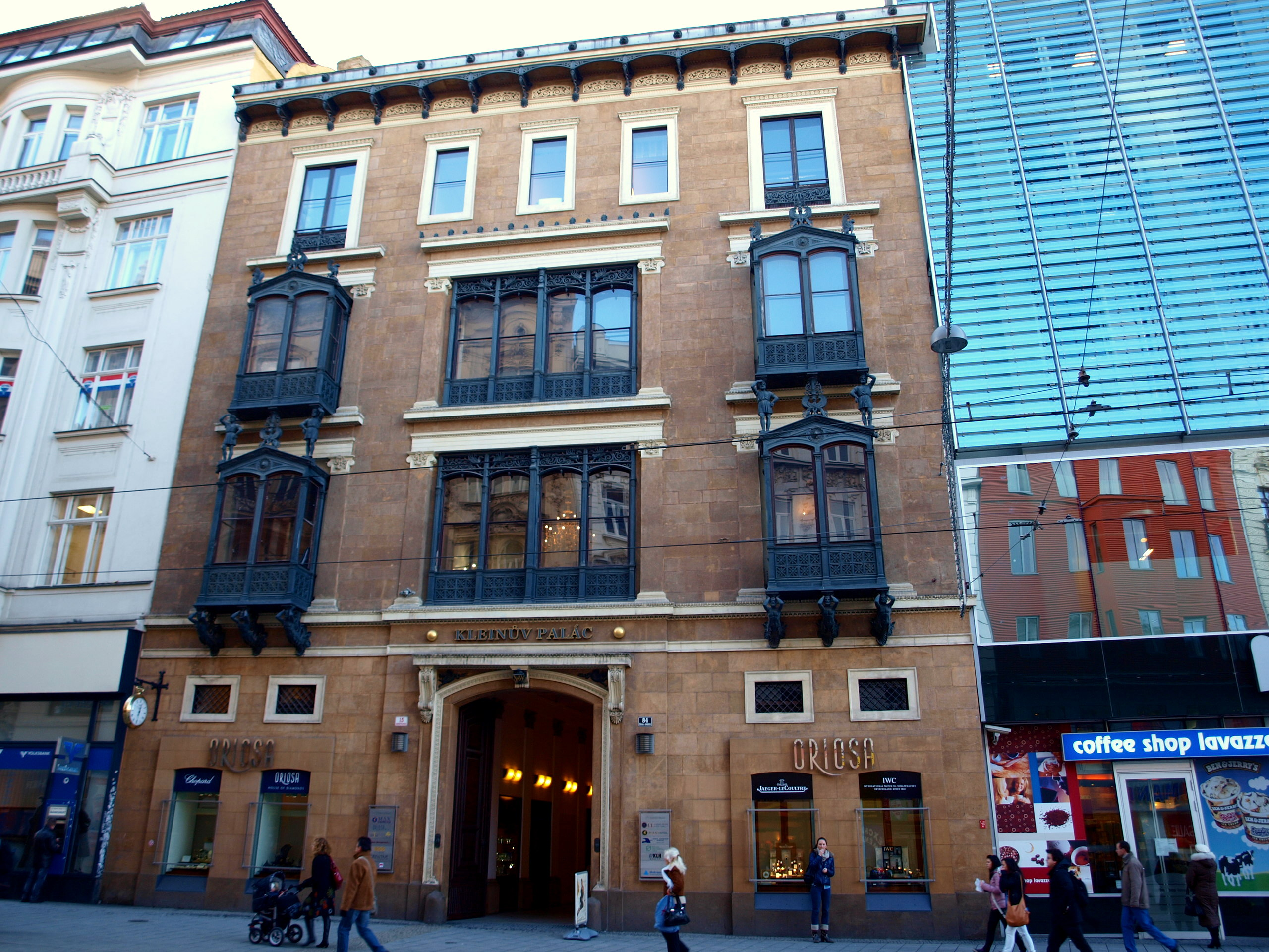 Kleinův palác, Brno